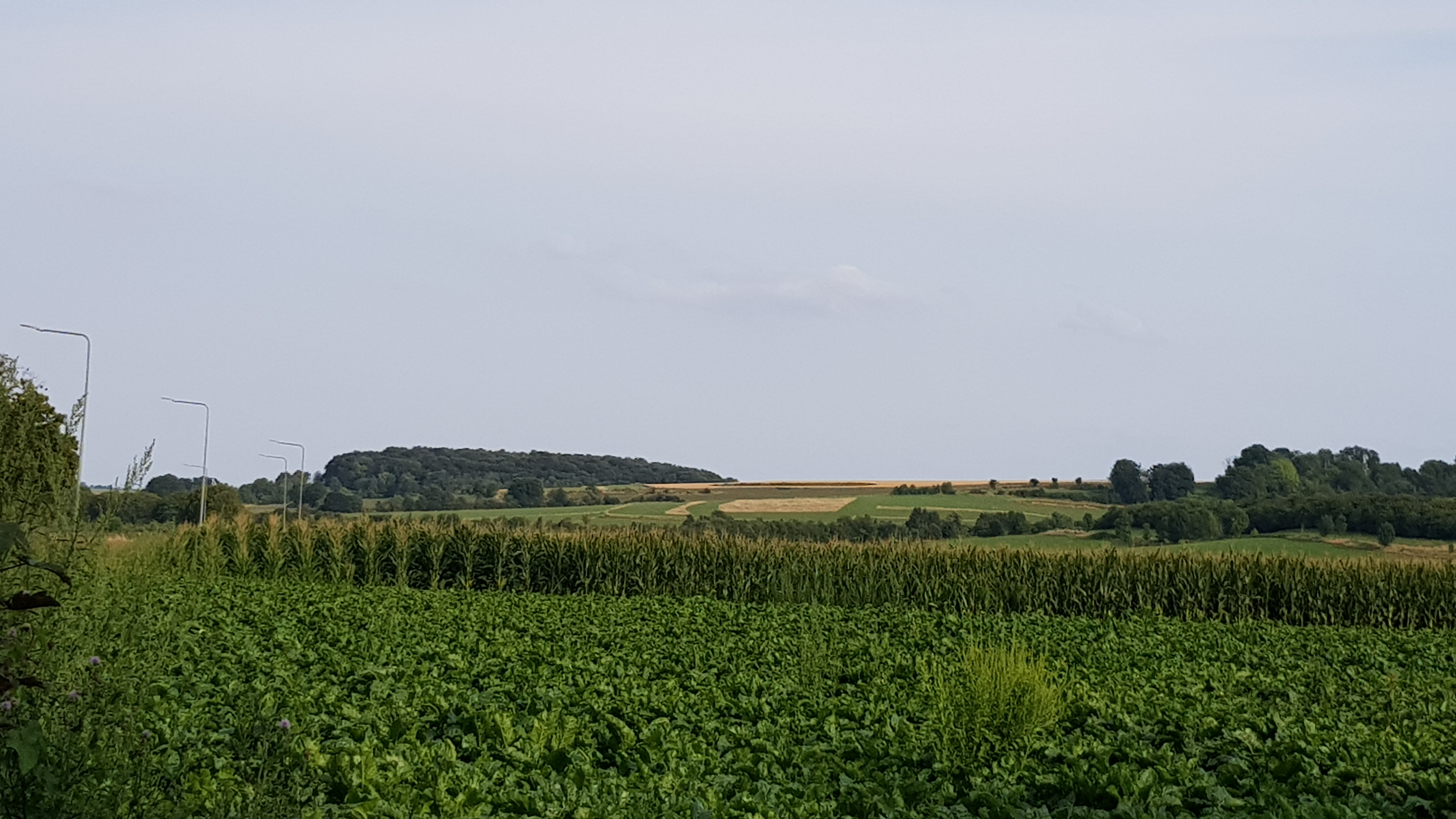 Sousberg gezien vanuit het noordwesten, Schin op Geul, Nederland